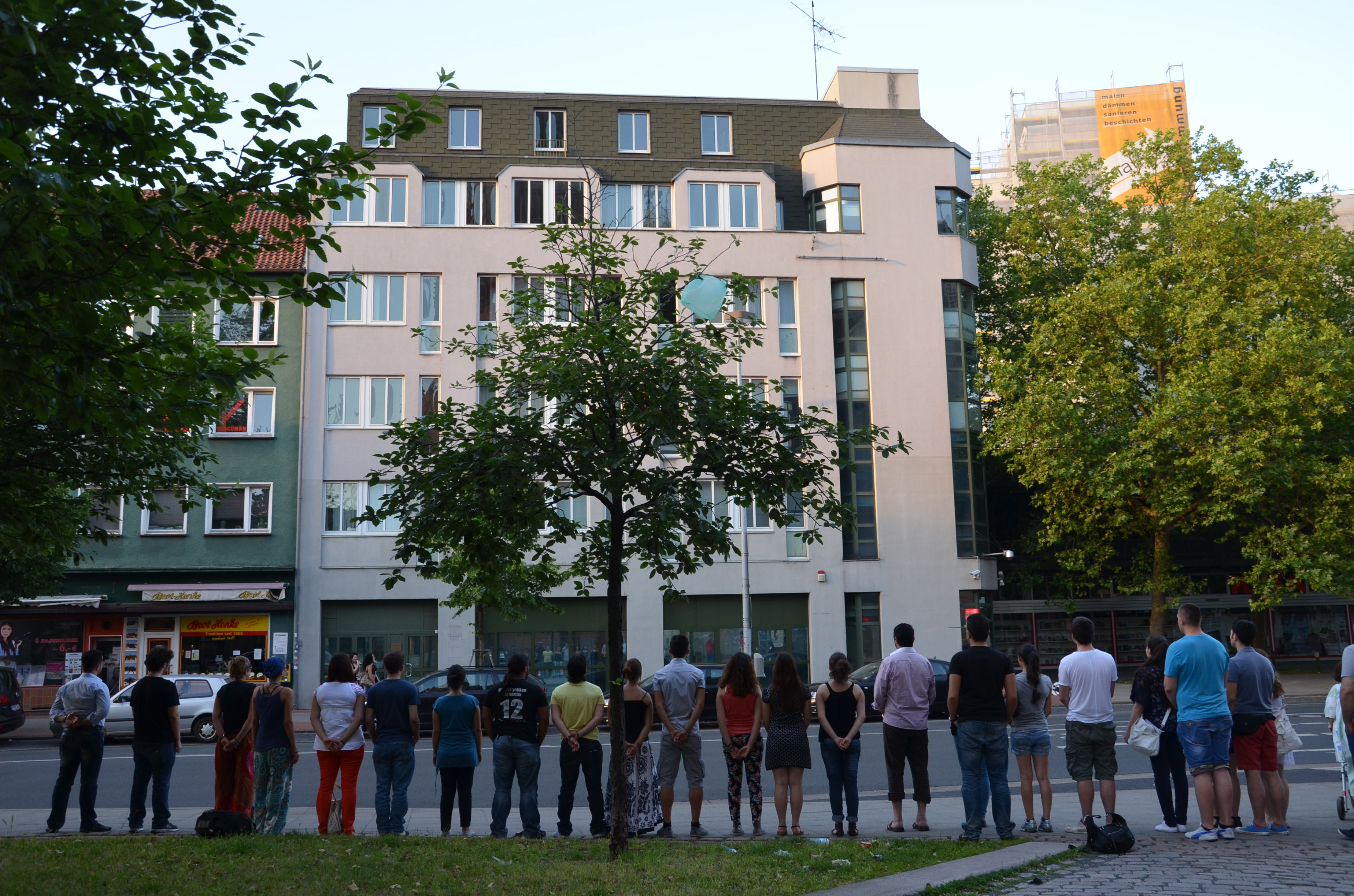 Diese Menschen, deren Namen und Gesichter aus Sicherheitsgründen hier nicht veröffentlicht werden, zeigen als sogenannter duran adam („stehender Mann“) vor dem Türkischen Generalkonsulat nahe der Mahnwache am Klagesmarkt in Hannover stillschweigend und regungslos ihre Solidarität mit den Menschen, die 2013 in der Türkei protestierten gegen die Politik der Regierung von Ministerpräsident Erdoğan.